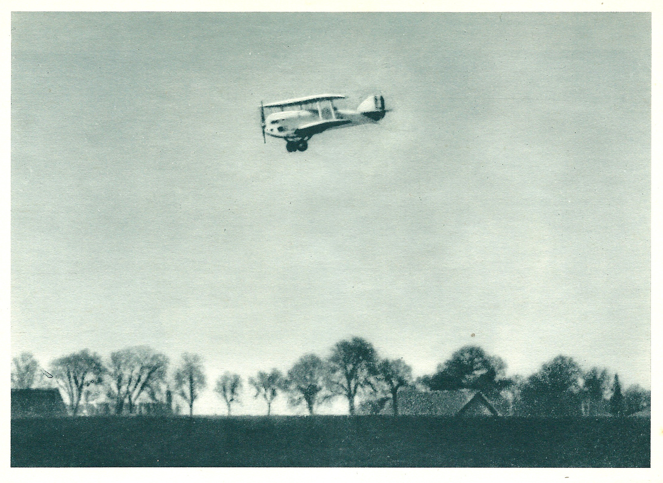 Charles Nungesser ; atterrissage de l'Oiseau blanc durant les essais.